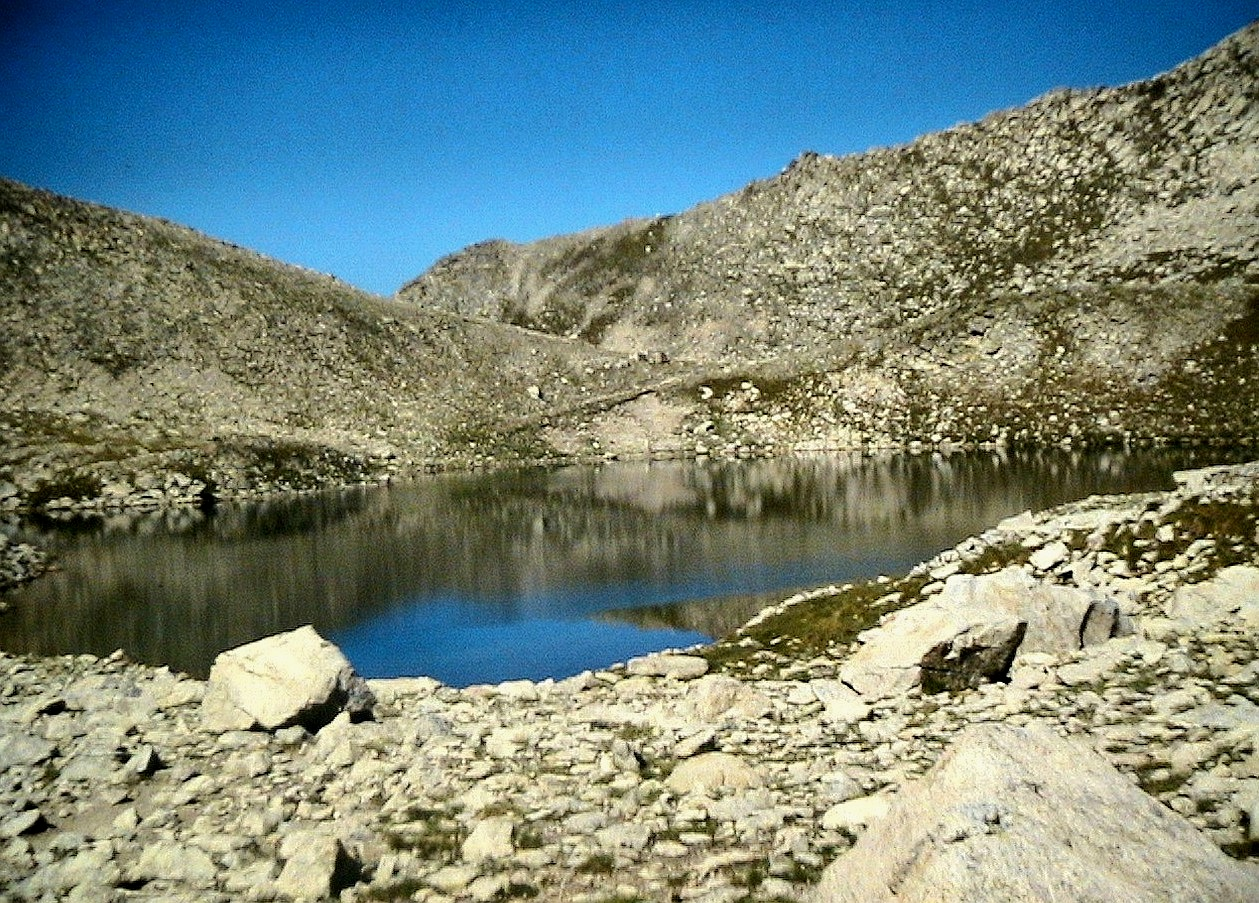 L'estany més oriental dels Vidals d'Amunt, a Cabdella. La Torre de Cabdella (Pallars Jussà - Catalunya). Foto presa de la projecció d'una diapositiva.